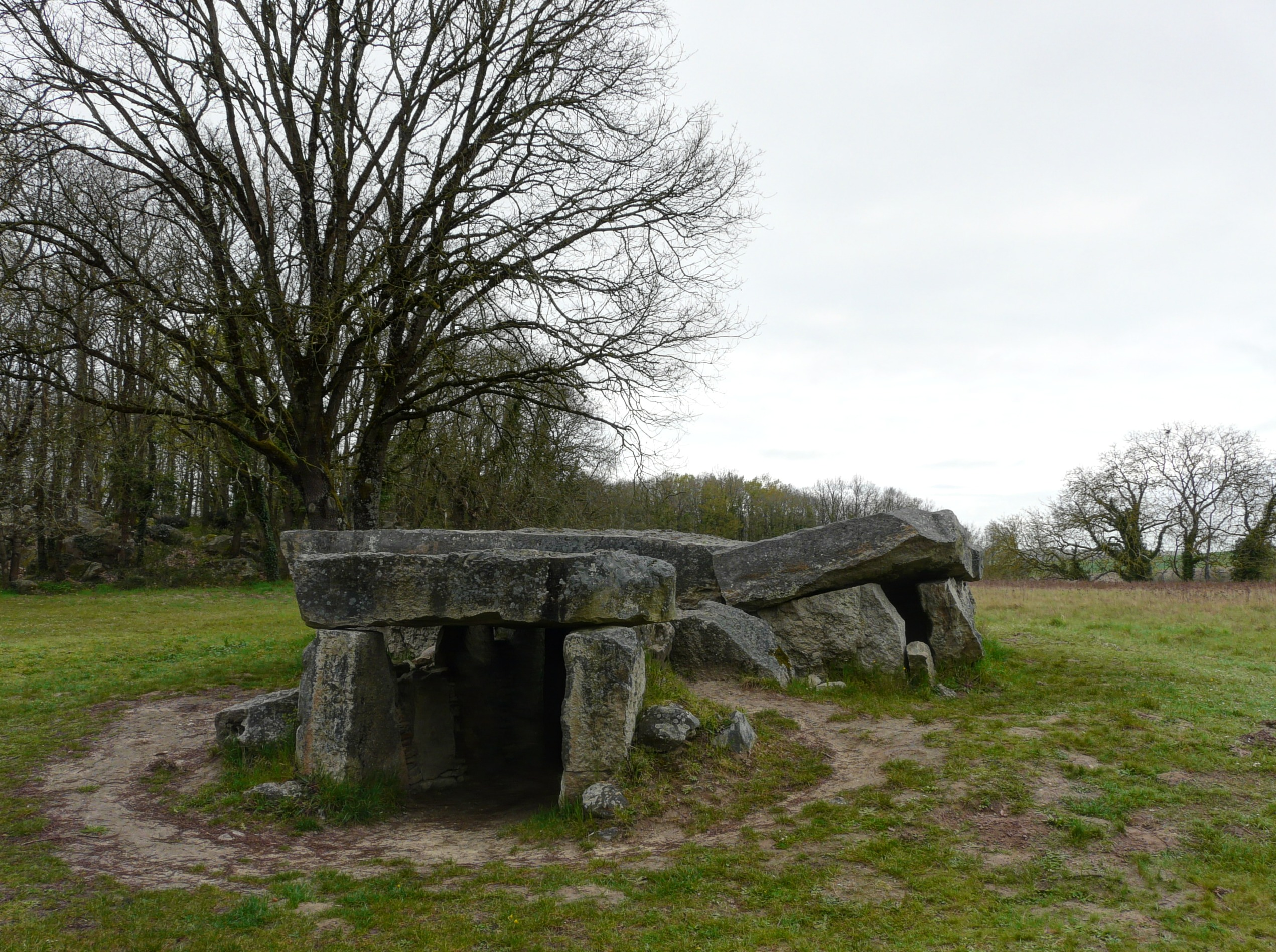 Dolmen de La Bajoulière